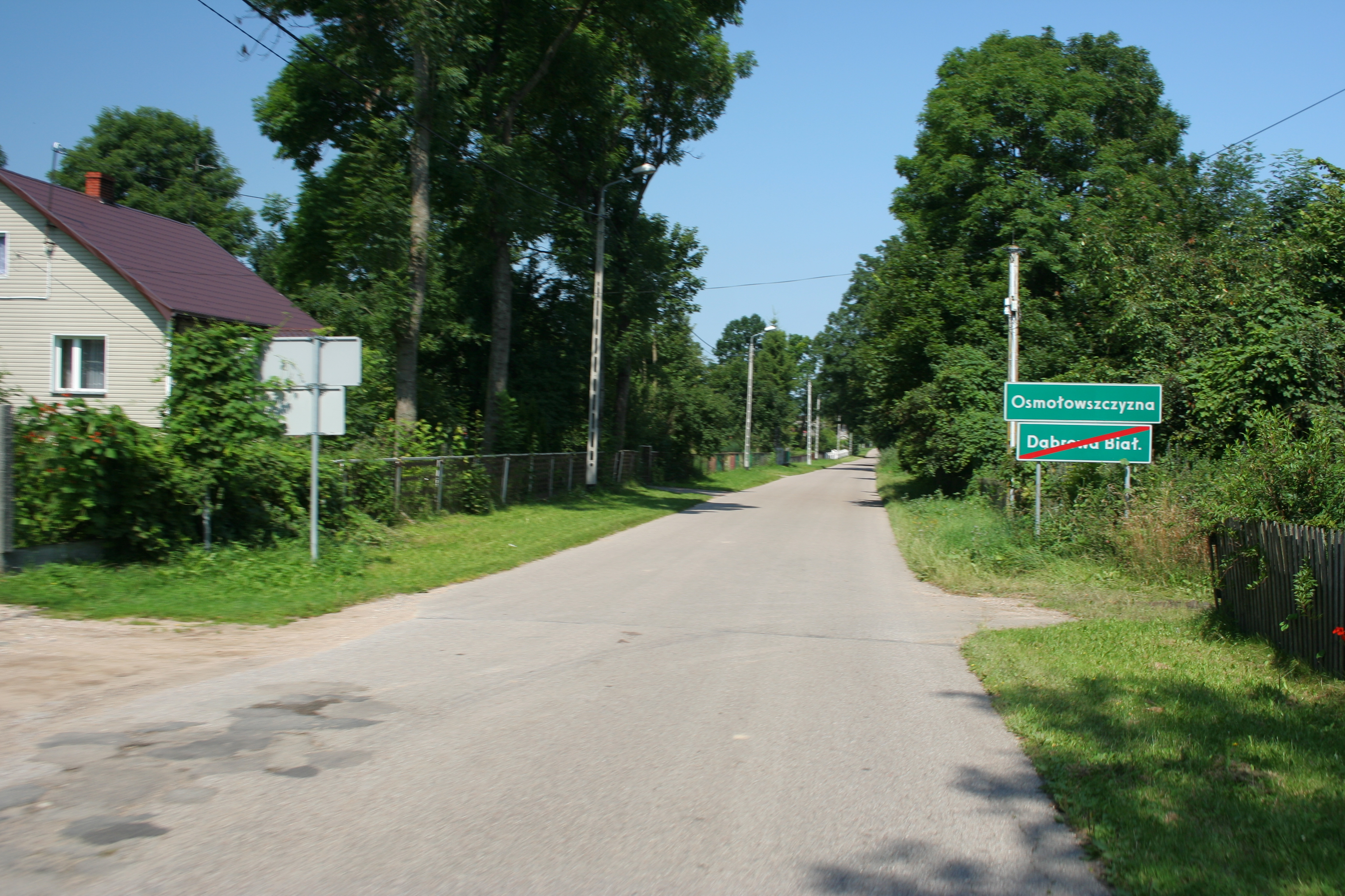 Droga wjazdowa do wsi Osmołowszczyzna.